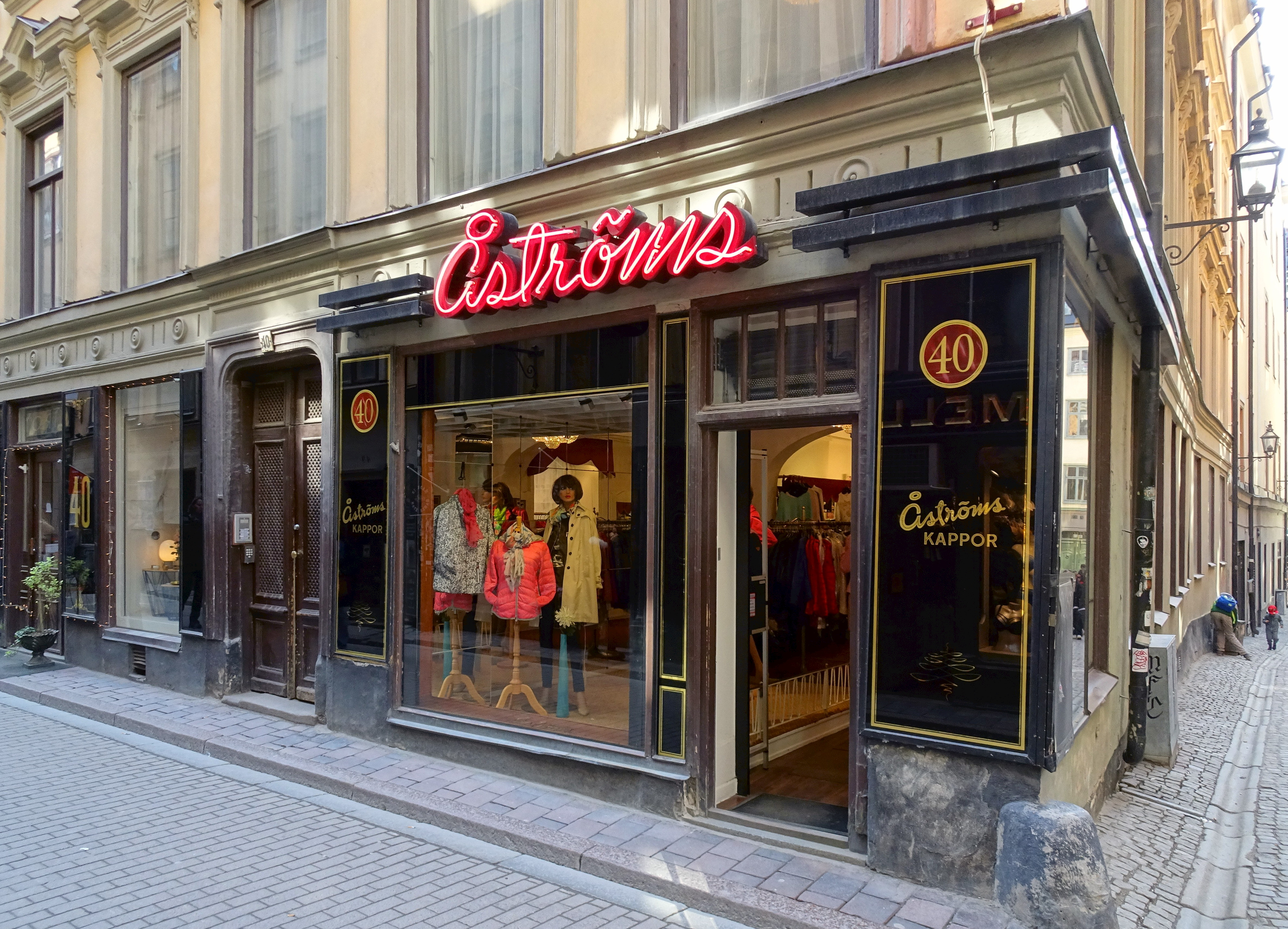 Västerlånggatan 40